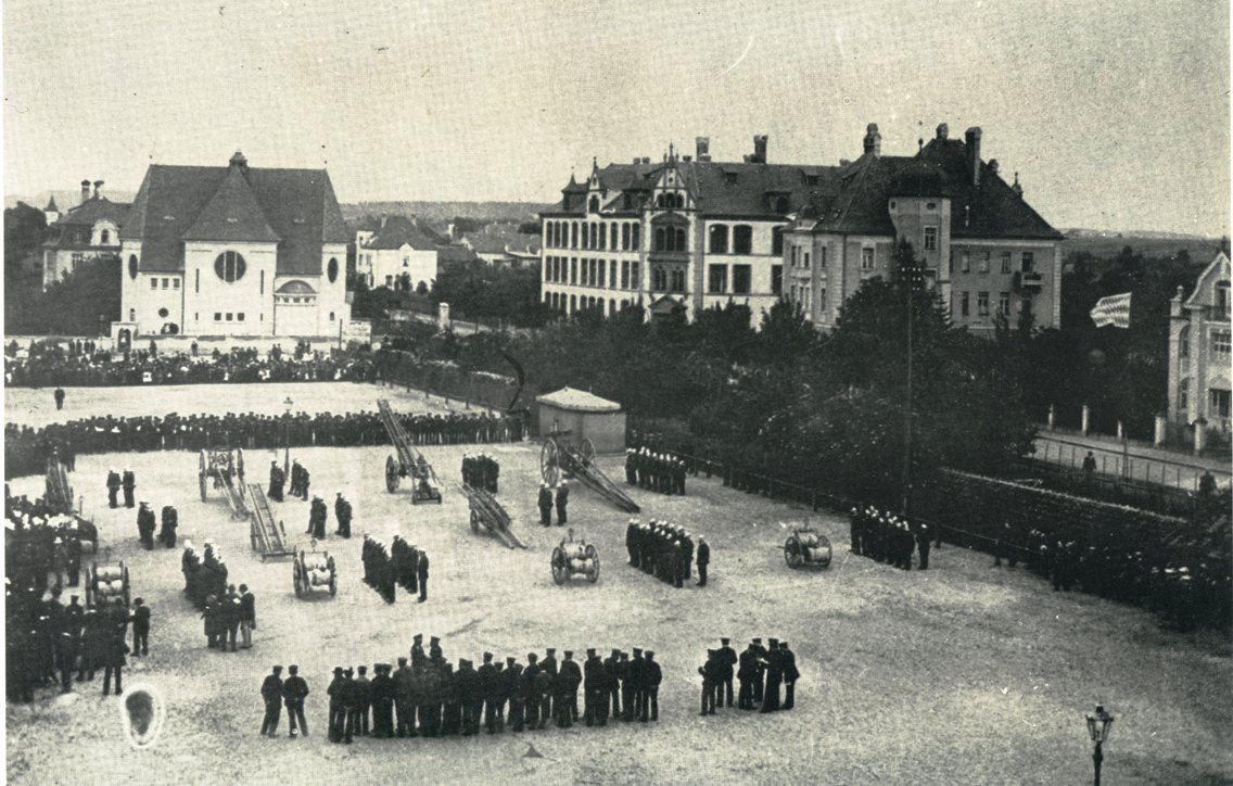 Der Westertorplatz mit der Synagoge (links) und der Bismarckschule (mittig). Anläßlich der 50 Jahr-Feier der freiwilligen Feuerwehr eine Löschübung auf dem Westertorplatz.